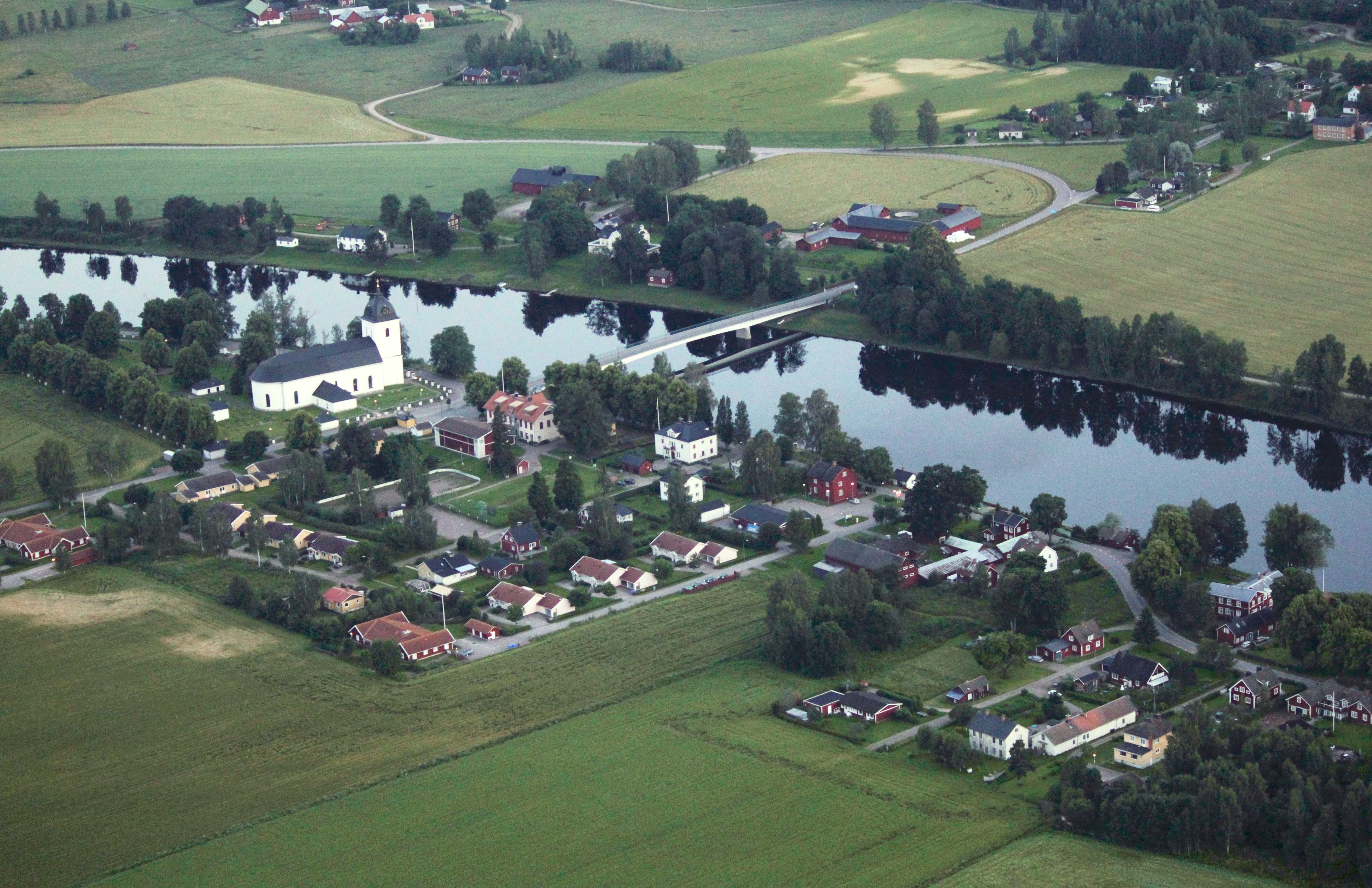 Flygfoto över Hedemora kommun, Dalarnas län, Sverige This aerial photograph has been approved for publishing by the Swedish Armed Forces with the ID: FMTM 10 830:11043 This tag does not indicate the copyright status of the attached work. A normal copyright tag is still required. See Commons:Licensing for more information.